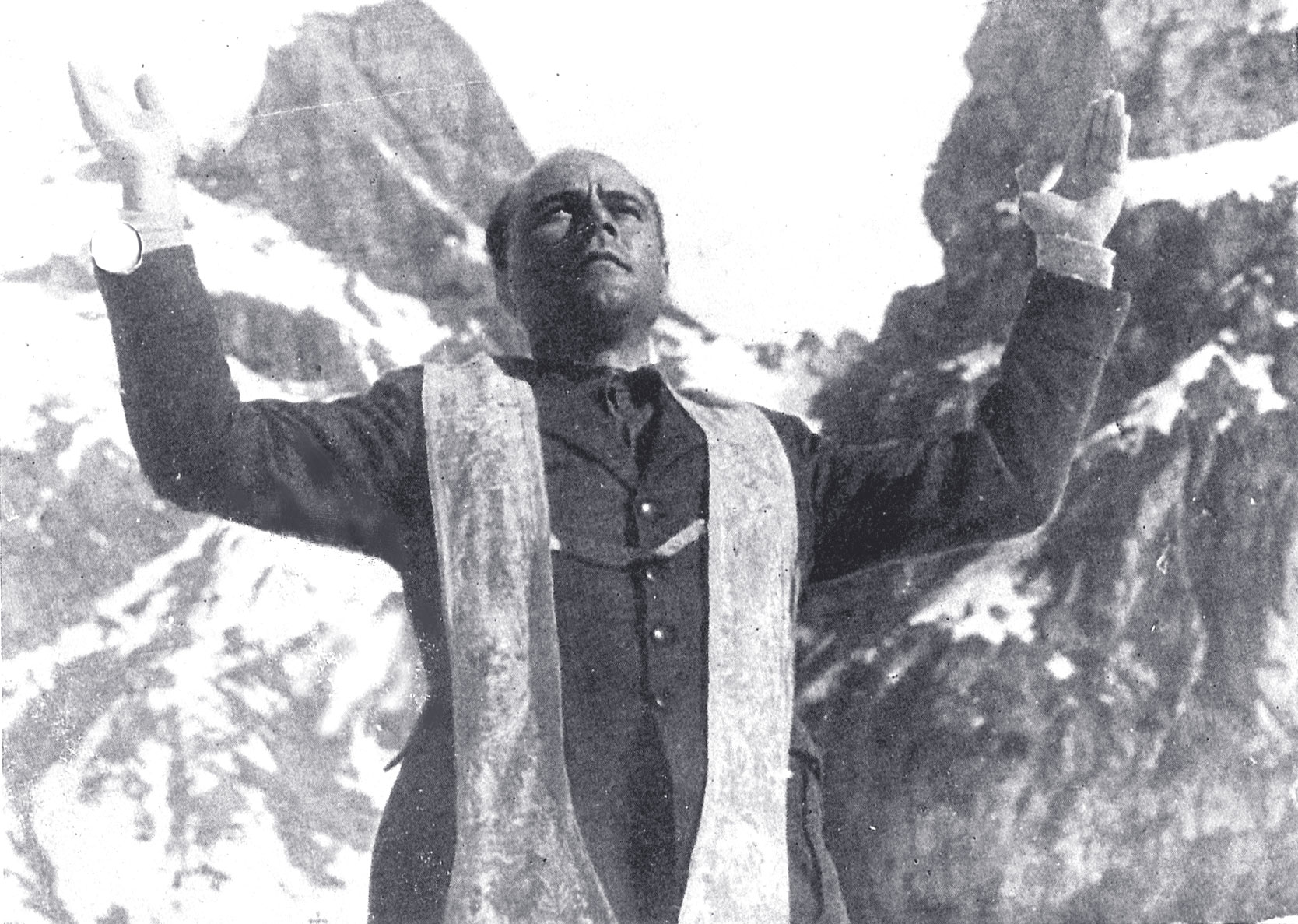 "I trecento della Settima" (M. Baffico, 1943), scena del film